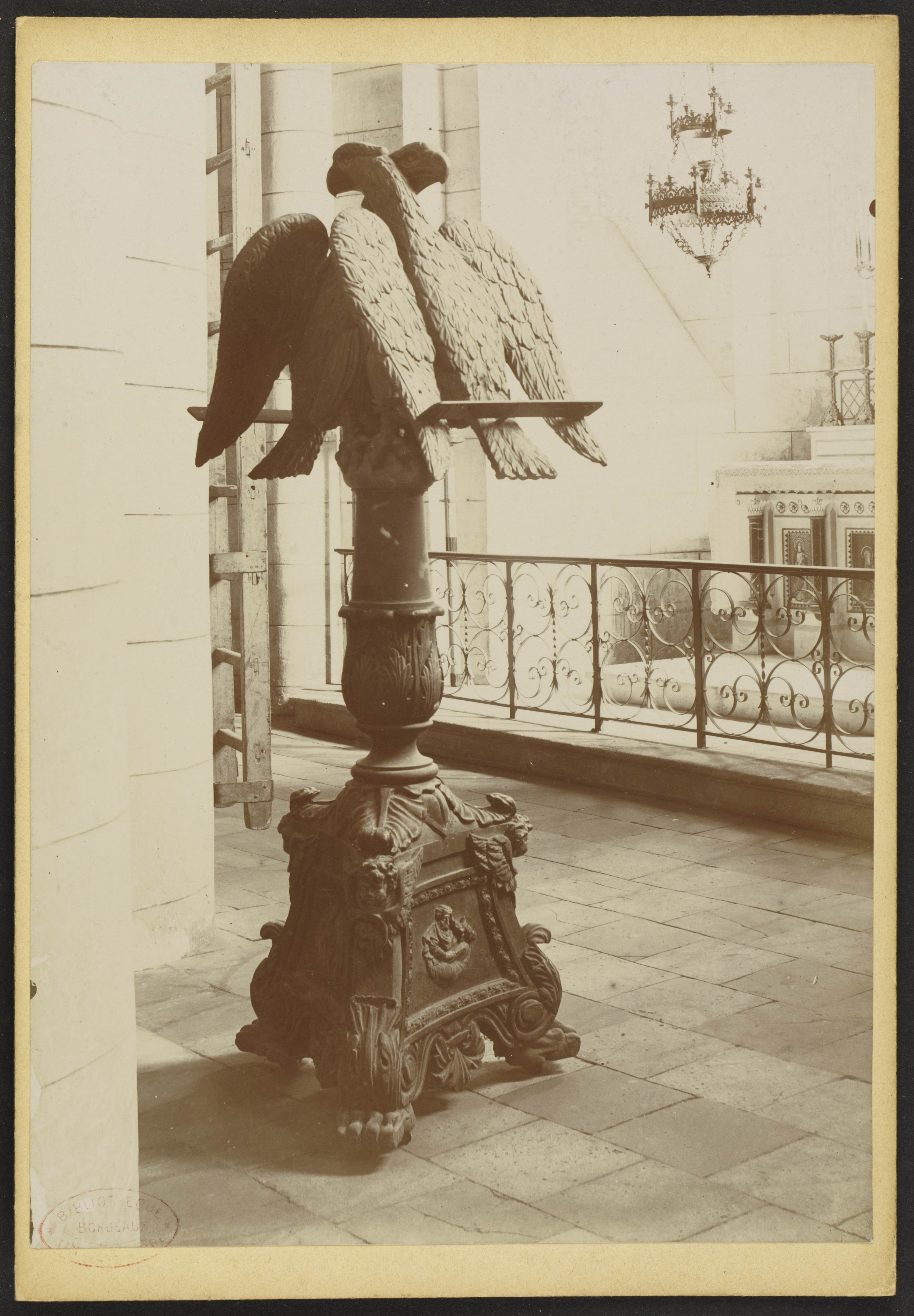 Église Notre-Dame de Guîtres; aigle-lutrin